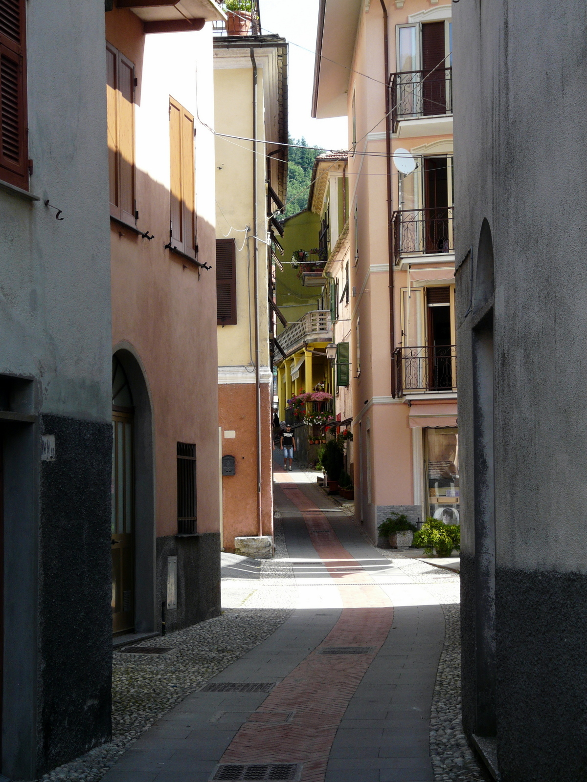 Centro storico di Montebruno, Liguria, Italia